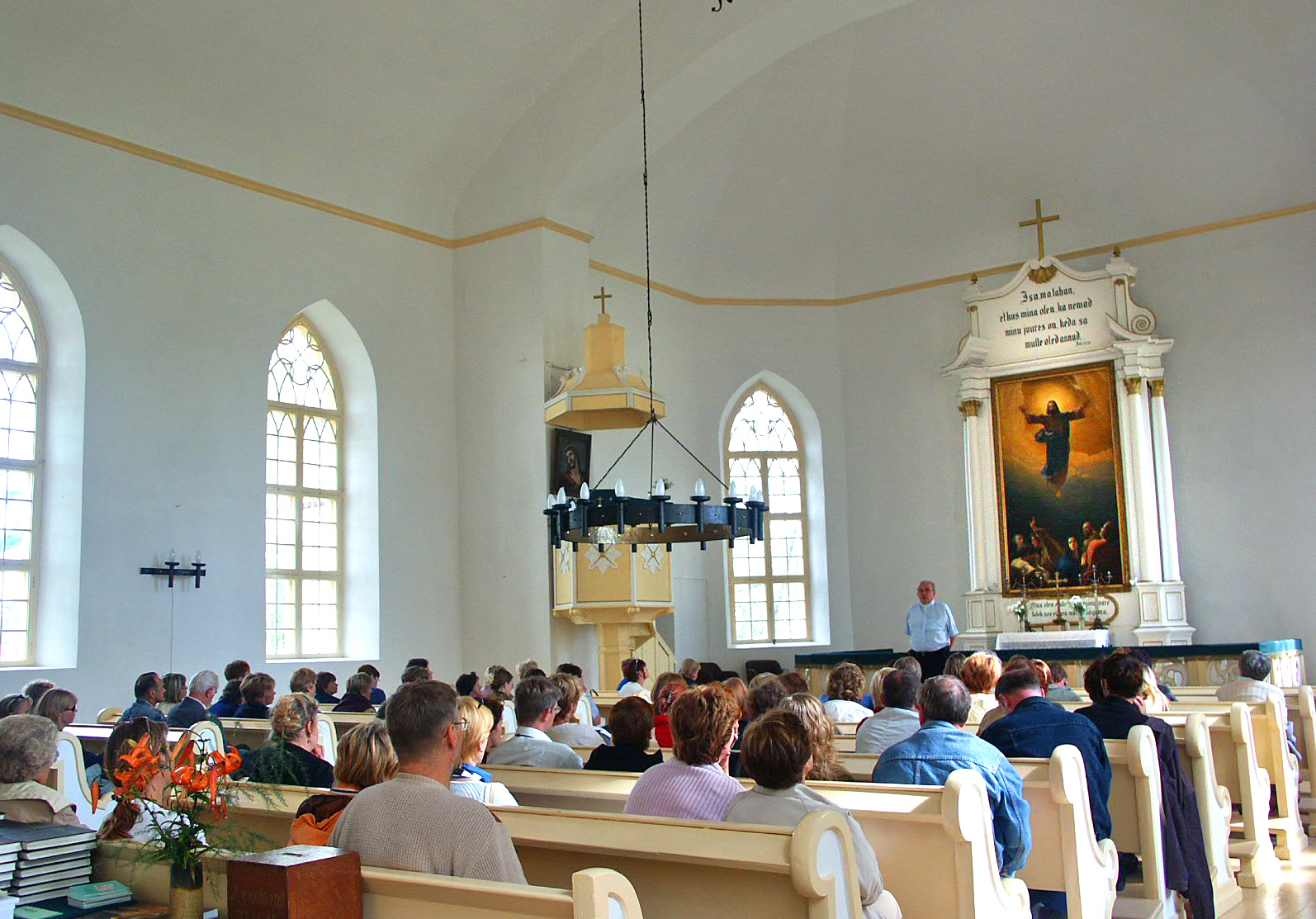 Mustvee kirik seest